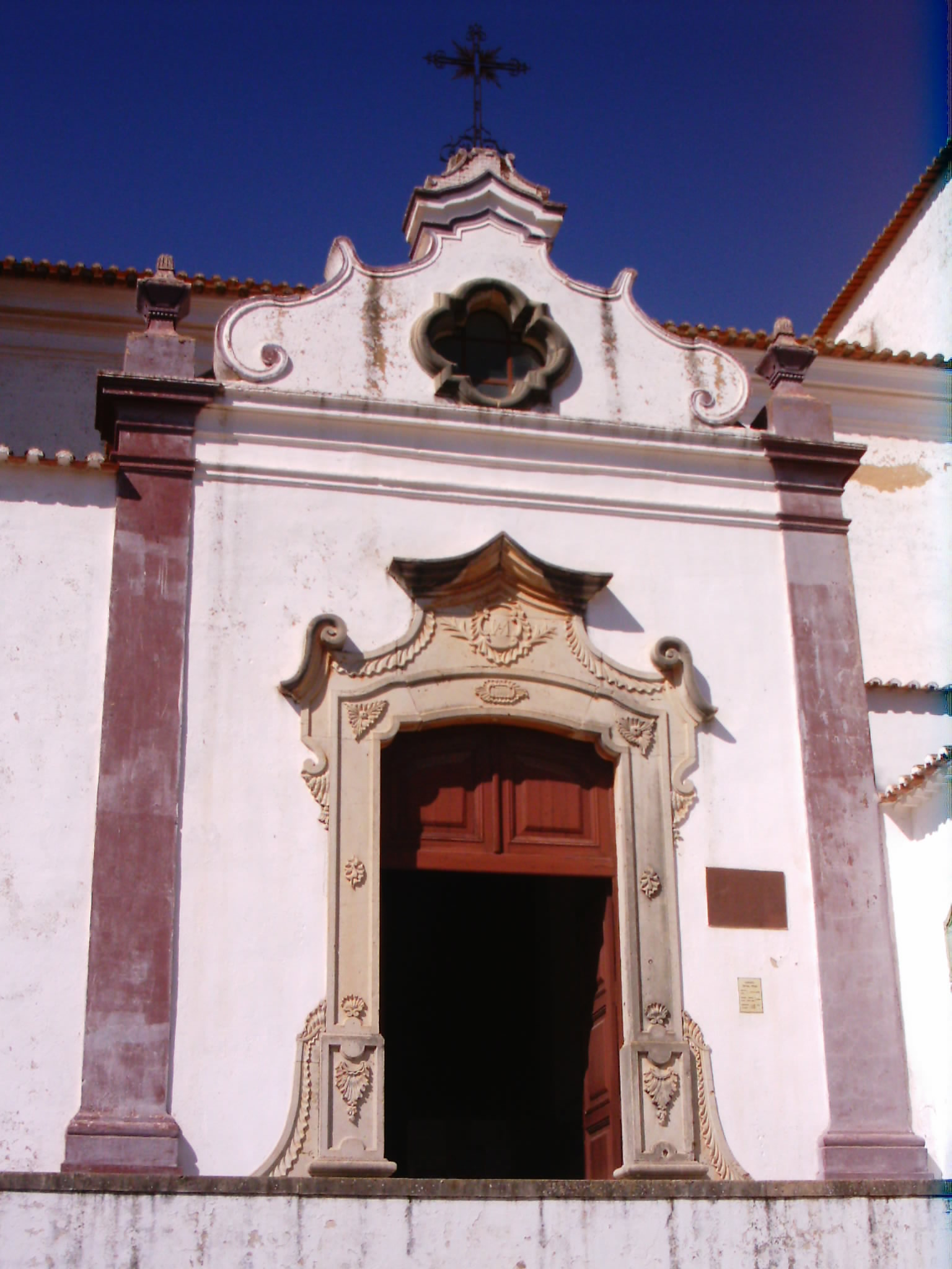 Portal lateral da Sé Catedral de Silves, Portugal.